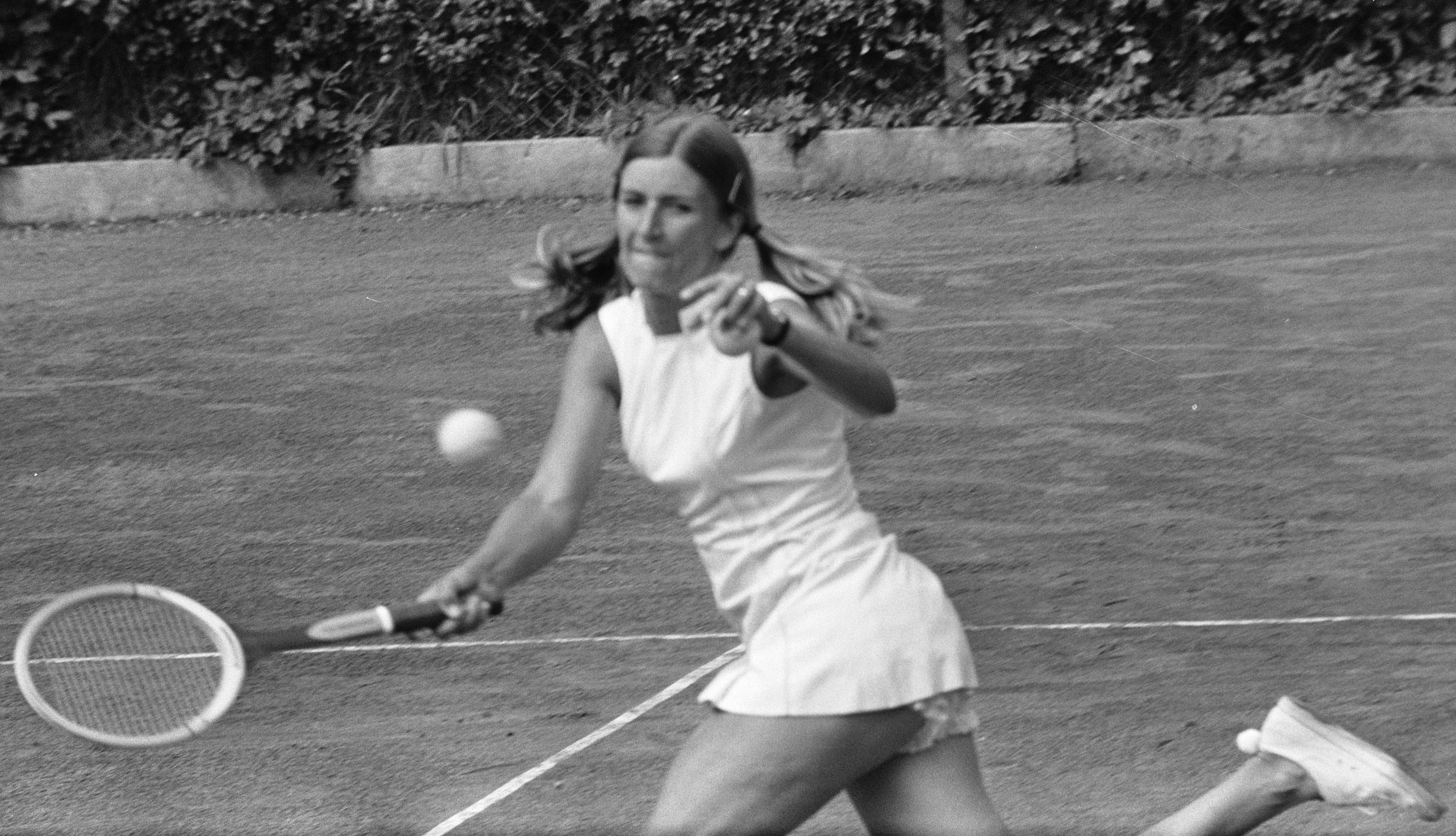 M. Procter (Zuid-Afrika) in actie